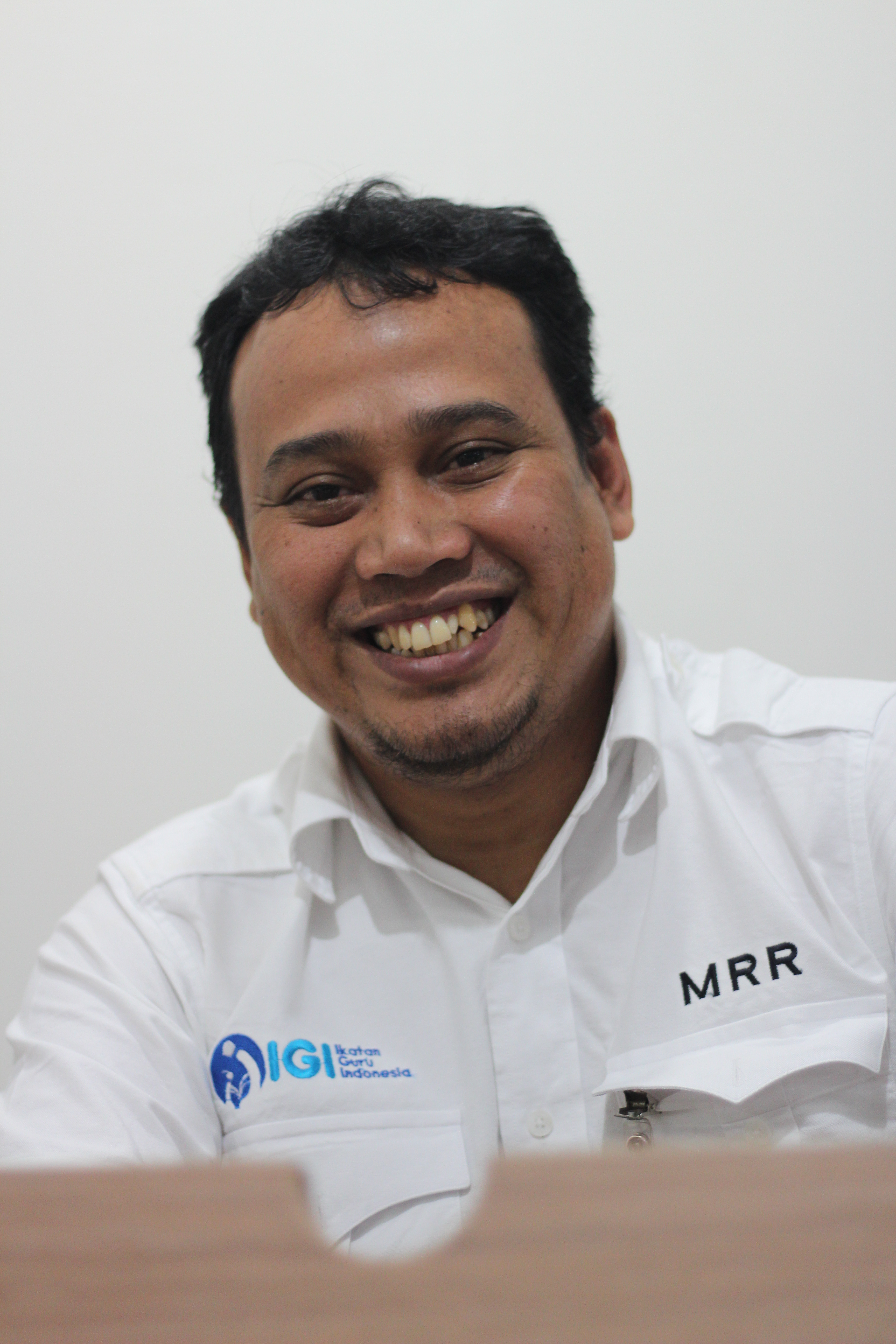 Muhammad Ramli Rahim, Ketua Ikatan Guru Indonesia periode 2016-2021.